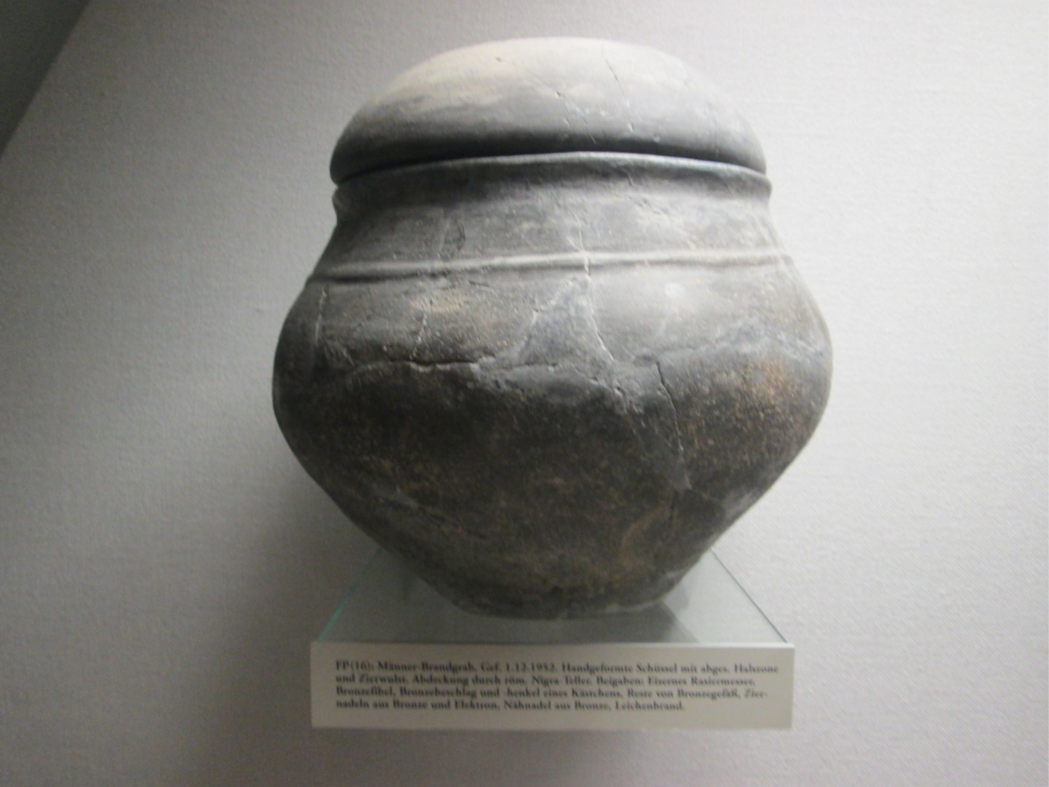 Keramik von einem Brandgrab der Neckarsueben im Lobdengau-Museum in Ladenburg